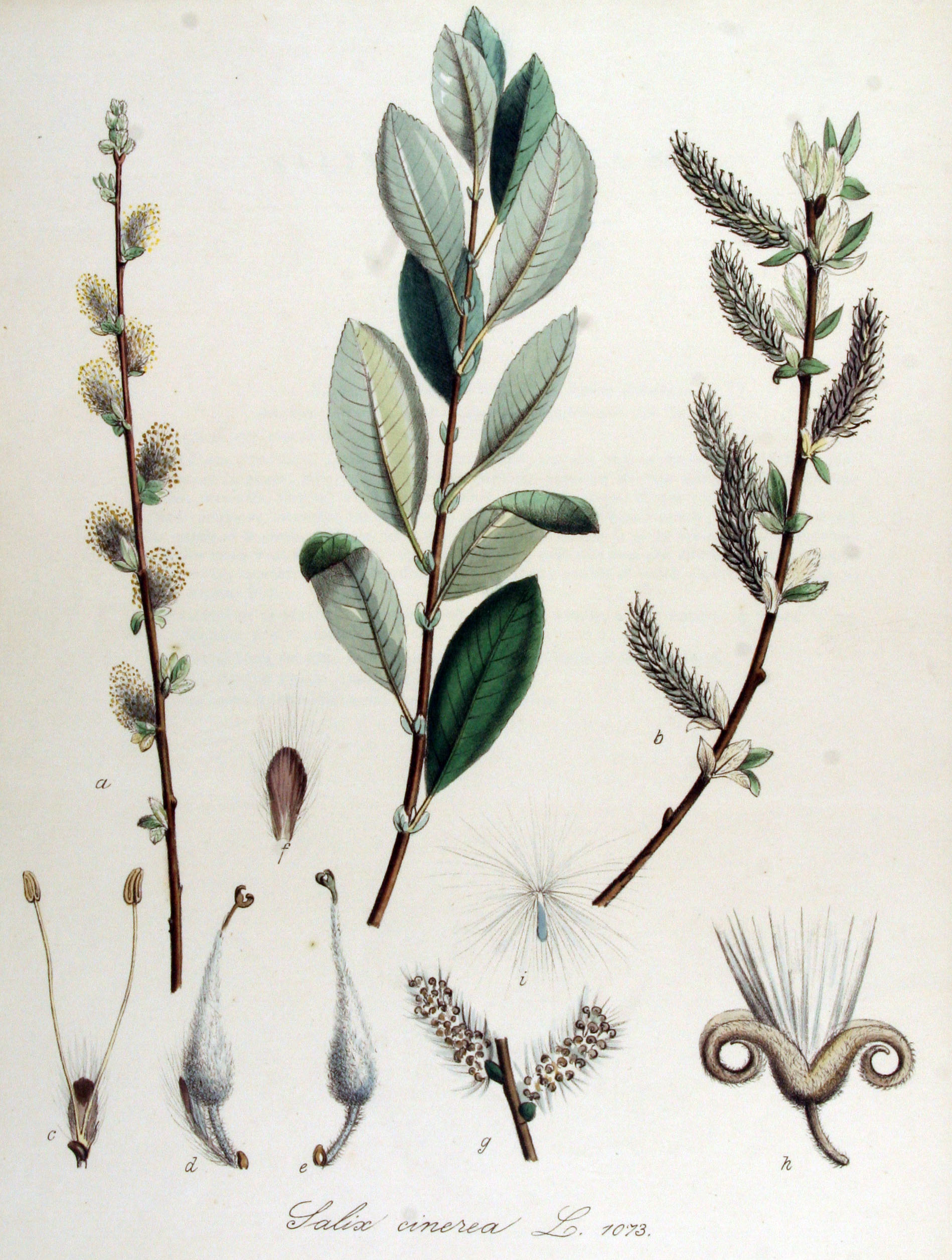 Salix cinerea L.